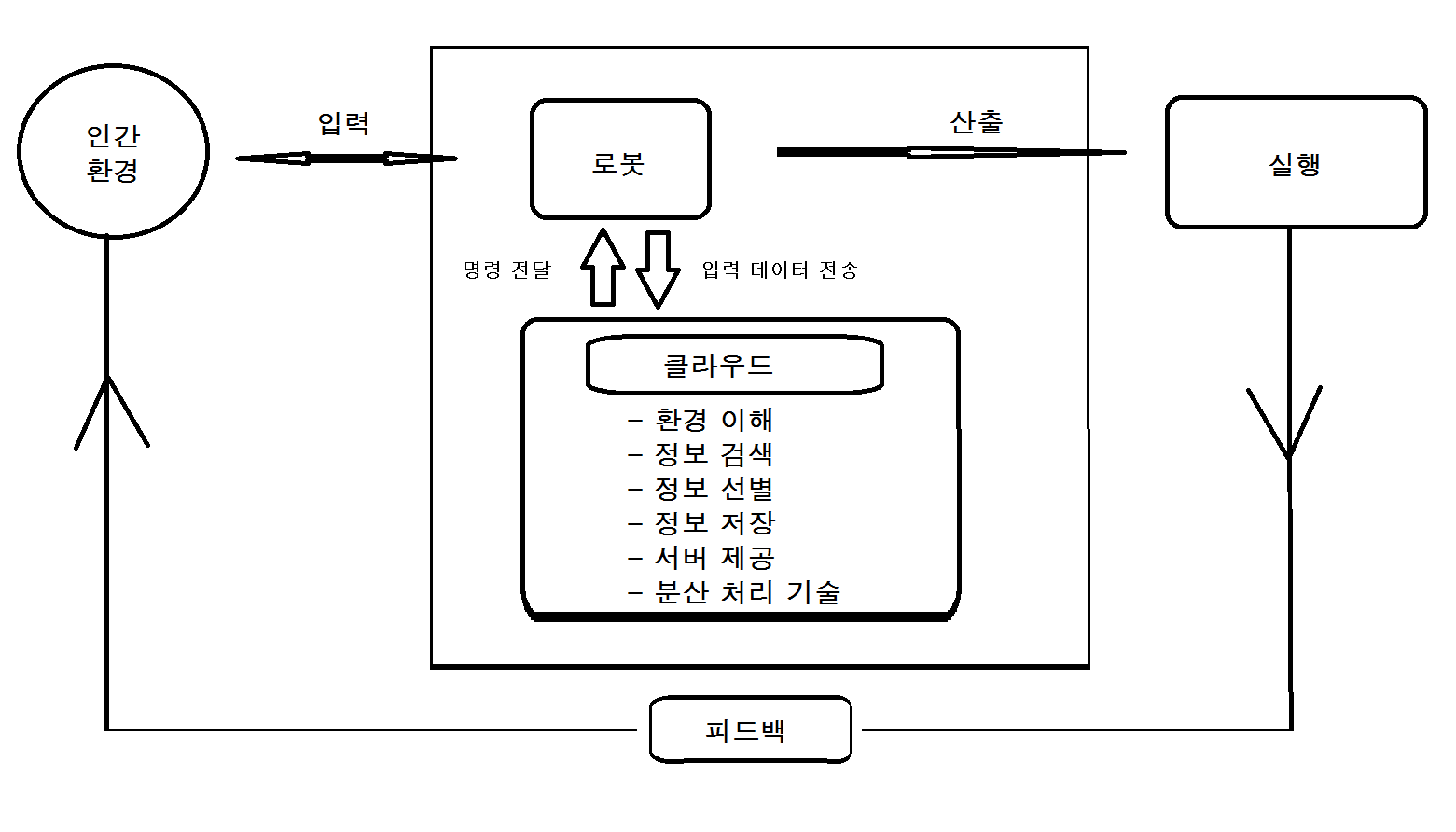 클라우드 로봇의 실행 과정